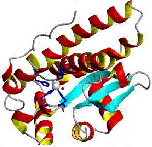 Mn human mitochondrial superoxide dismutase (monomeric unit) / Mn-SOD mitochondriale humaine (unité monomérique)